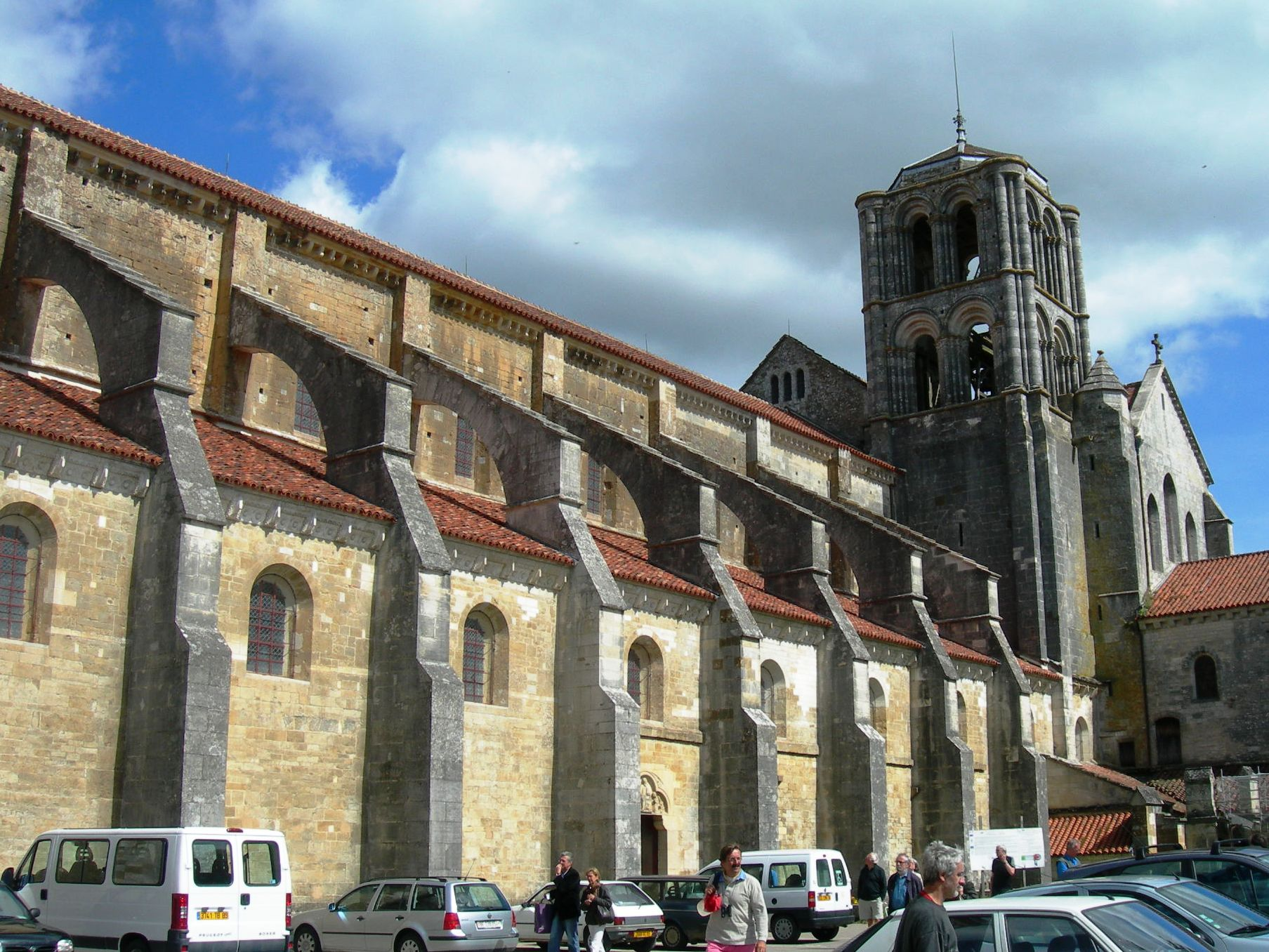 Ste Madeleine from SW.)